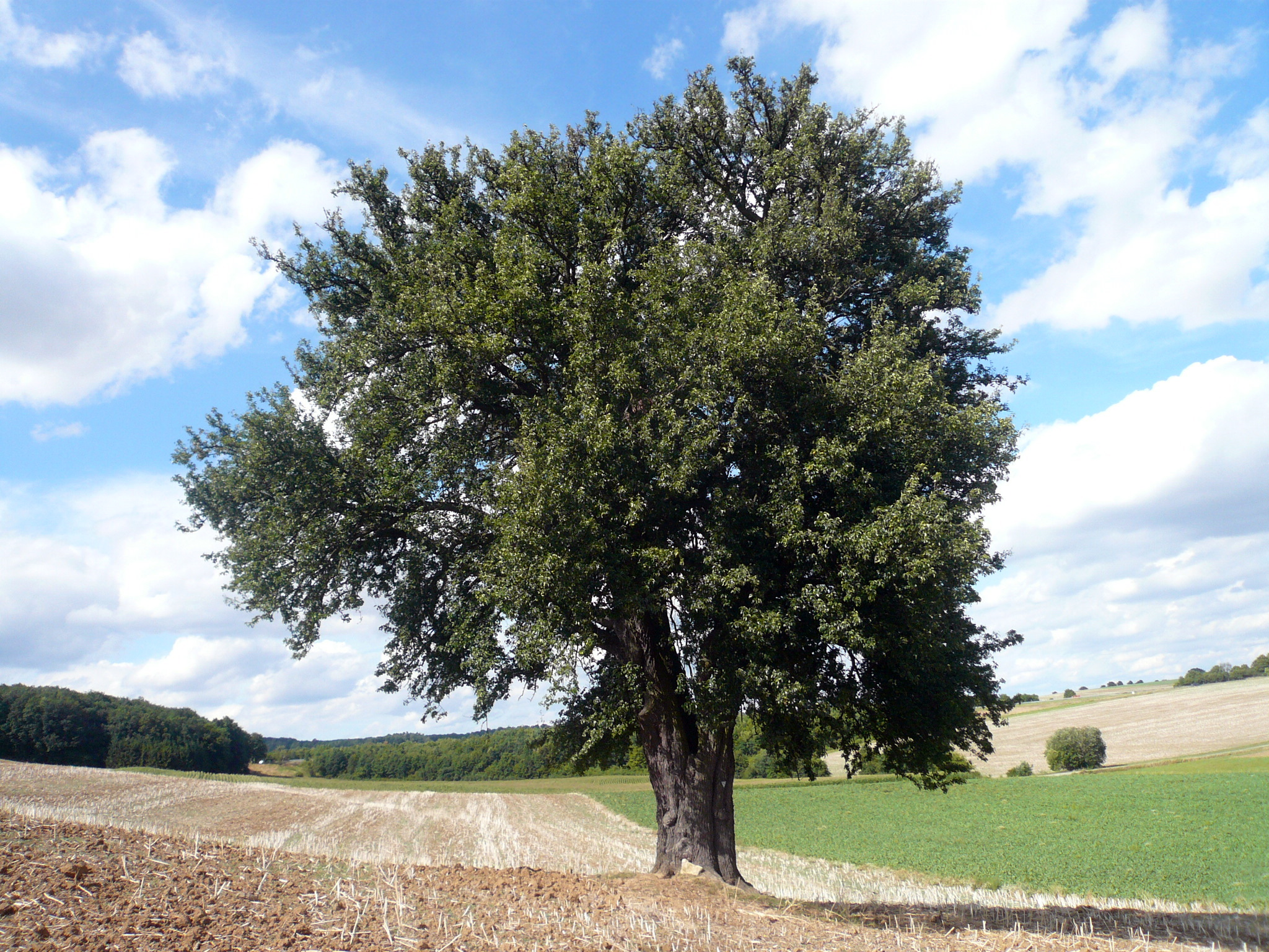 Birnbaum am Lerchenberg bei Wasserlosen. Die Wildbirne (Pyrus pyraster) hat einen Stammumfang von 4,6 Meter und etwa 17 Meter Kronendurchmesser und Höhe. Sie ist bei der Unteren Naturschutzbehörde des Landkreises Schweinfurt mit der Bezeichnung ND-05801 als Naturdenkmal gelistet.